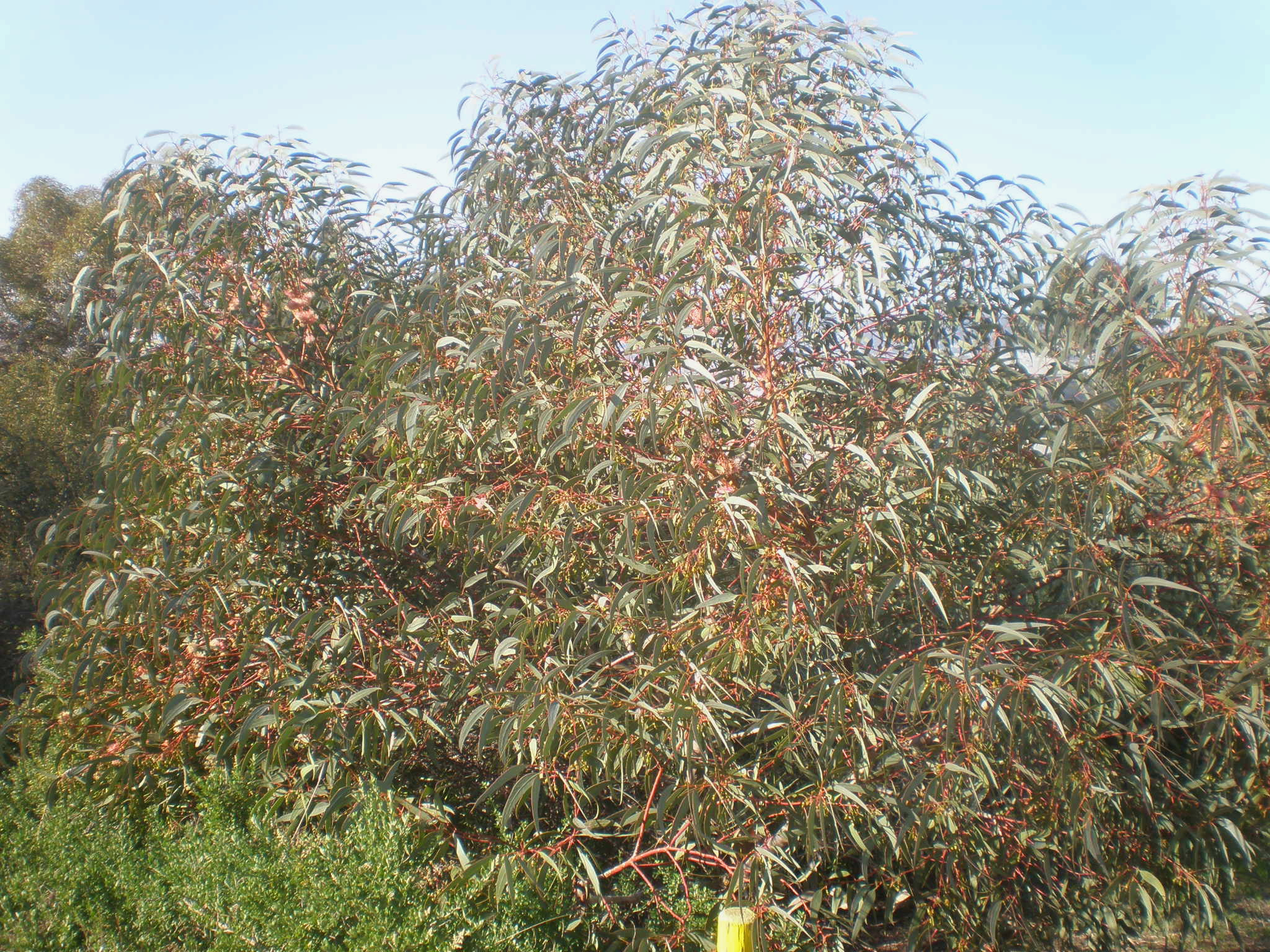 Jardín Botánico de Barcelona.